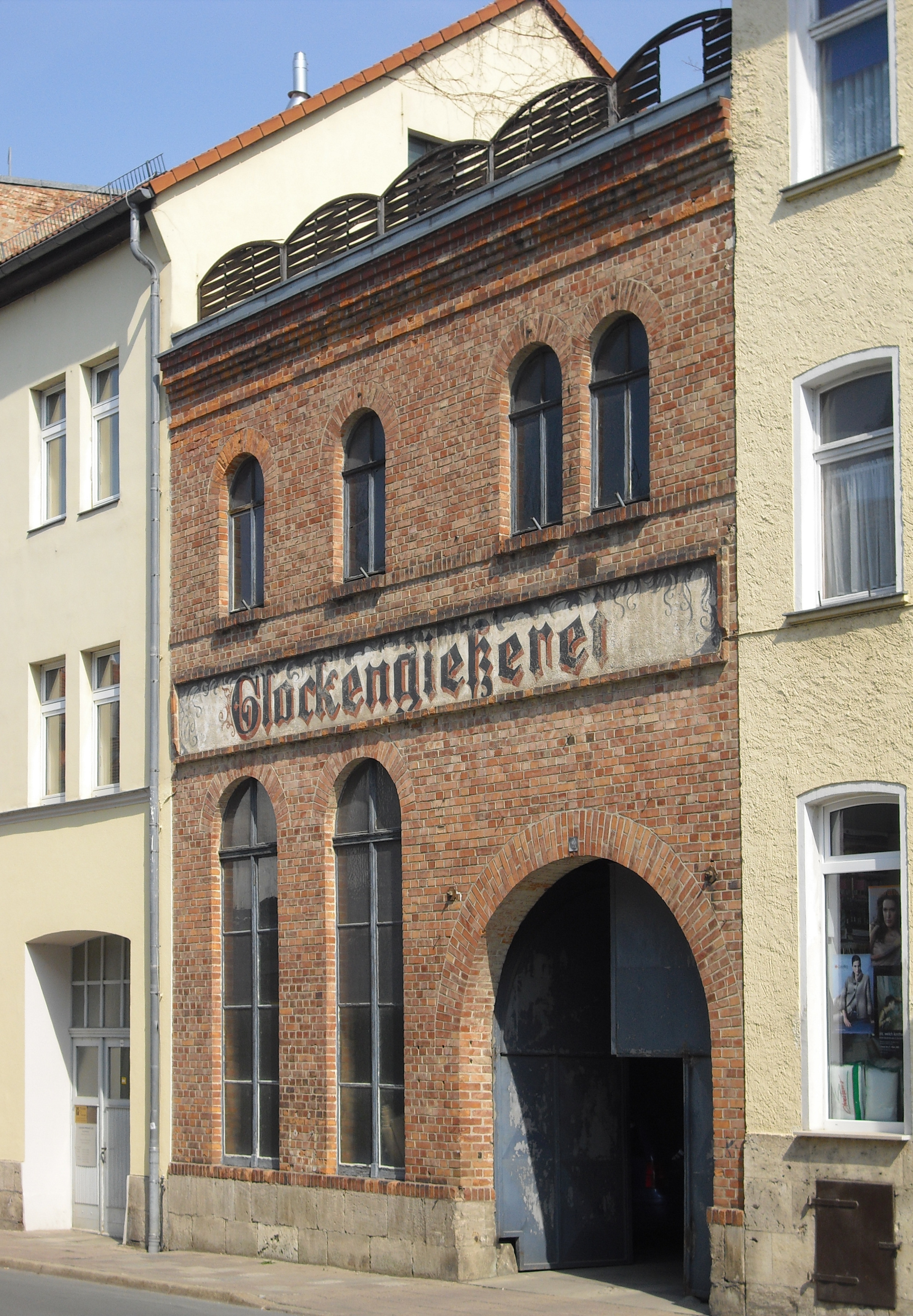 Glockengießerei